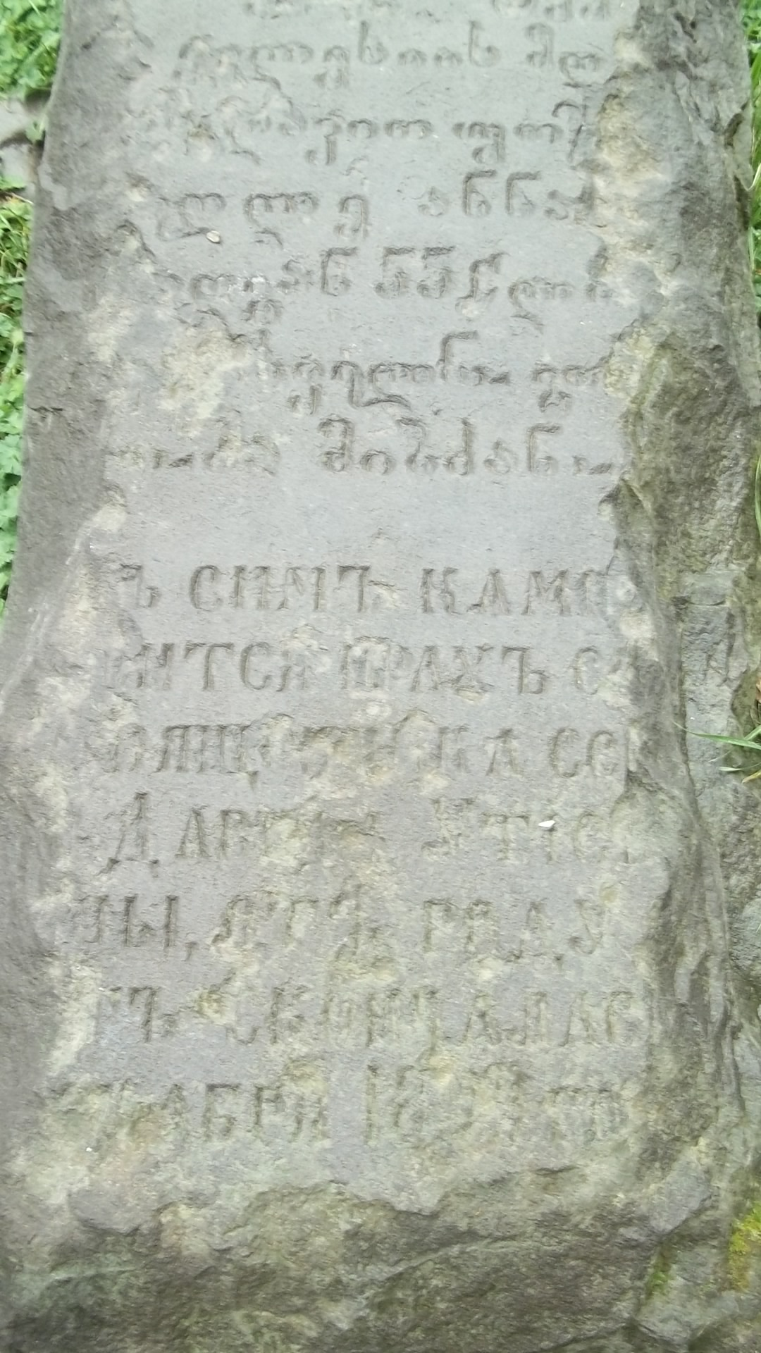 Şəki şəhərindəki rus kilsəsinin cənub tərəfində David Utiyevin qəbri